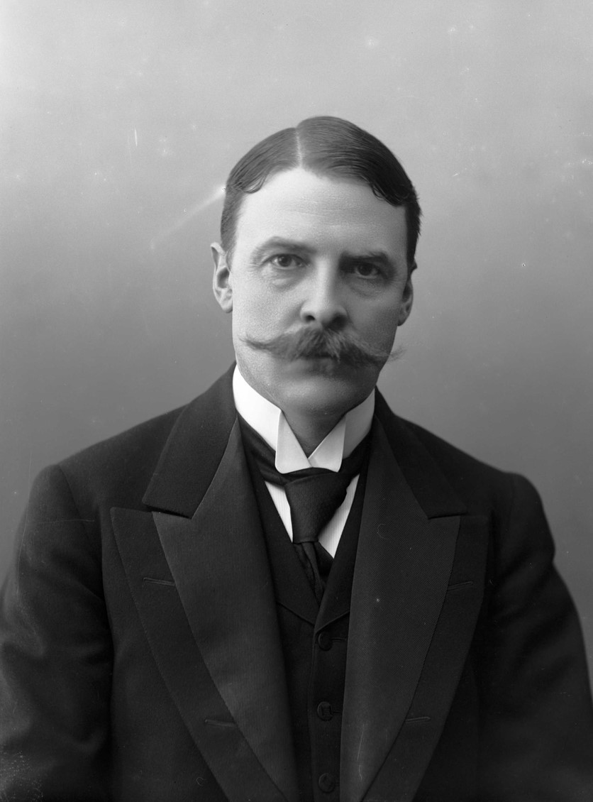 Johannes Irgens (1869–1939), diplomat og utenriksminister (H).